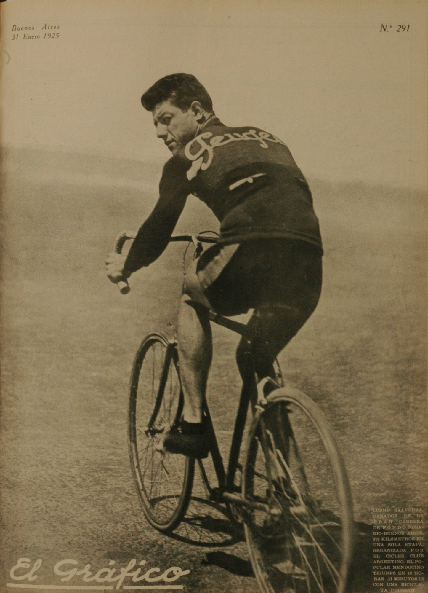 El Grafico del 31 de Enero de 1925. Edicion 291